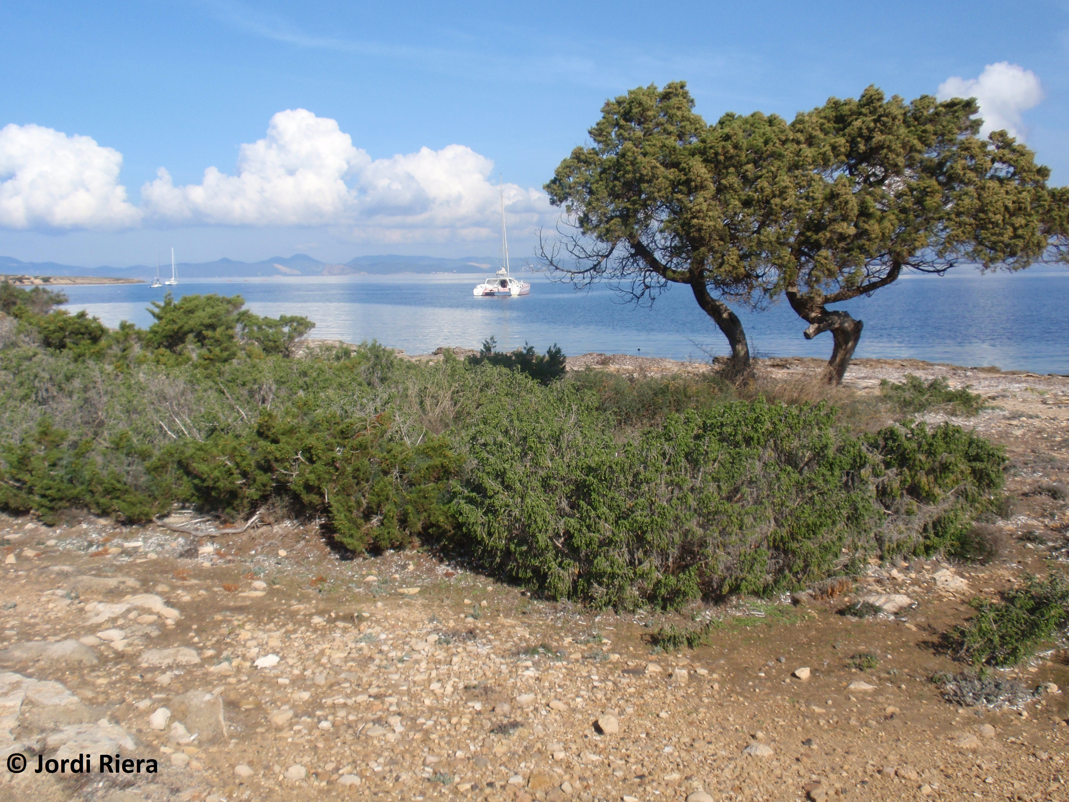 Es Caló de s'Oli, al fons: Eivissa. Banda nord de sa vénda de Portossalè